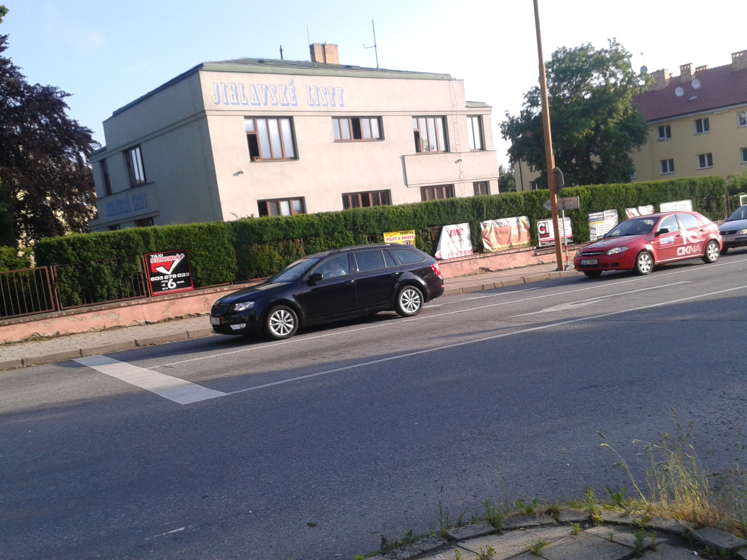 sídlo Jihlavských listů